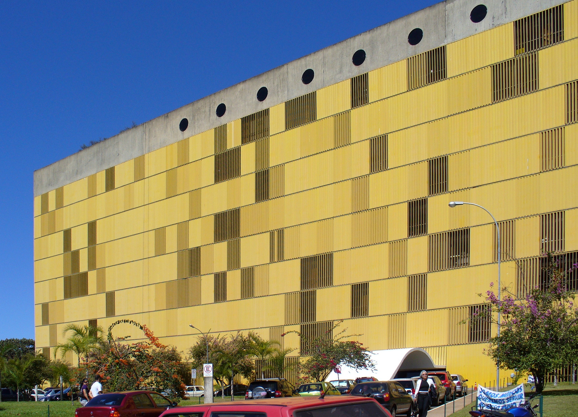 Anexo IV da Câmara dos Deputados, localizada a 15°48'9"S 47°51'55"W. Corrigida via ShiftN.